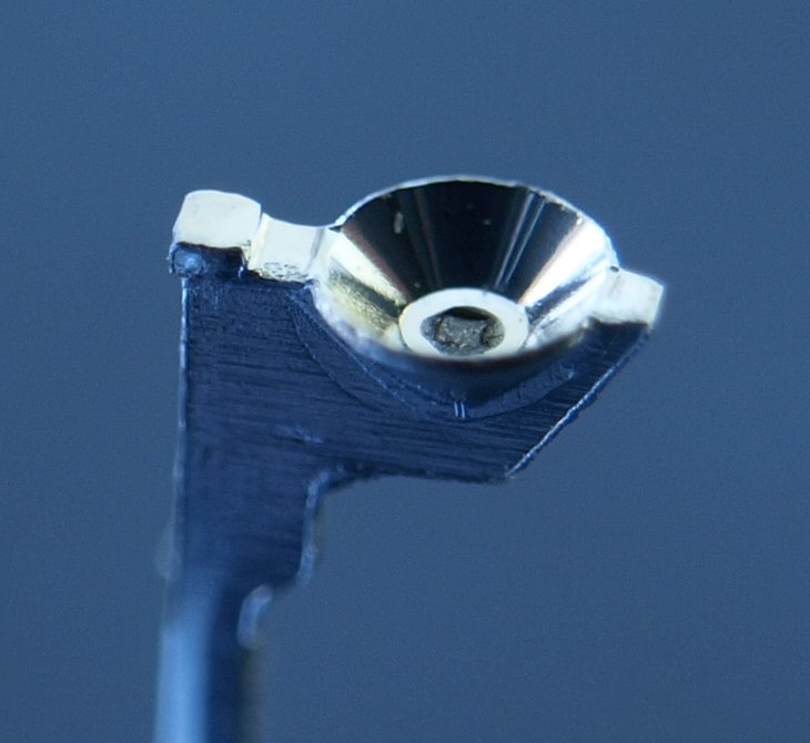 Reflektor einer grünen Standard-LED